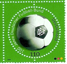 Bildbeschreibung: Das Bild zeigt die Sondermarke "100 Jahre Deutscher Fußball-Bund (DFB)" der Deutschen Post (Mi.Nr. 2091), herausgegeben am 13.1.2000 aus Anlass des 100. Geburtstages des DFB. Es war die erste runde Briefmarke Deutschlands. Die Marke wurde in 10er-Bogen herausgeben, in der linken oberen Ecken standen die Jahreszahlen 1900 und 2000 auf dem Rand. Quelle: Originalmarke Fotograf/Zeichner: RedPiranha Datum: eingescannt am 24.5.2006